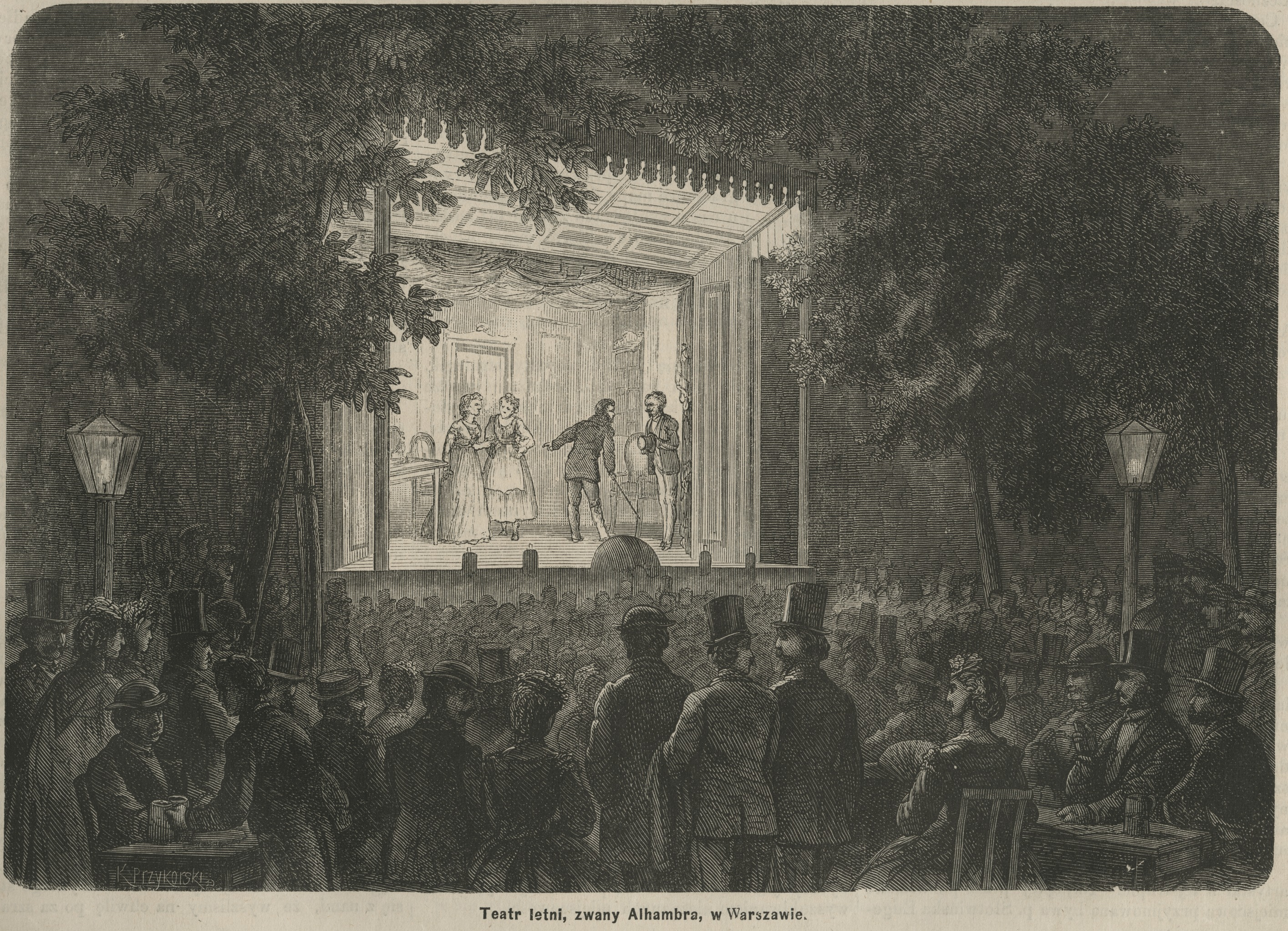 Teatr Letni, zwany Alhambra w Warszawie